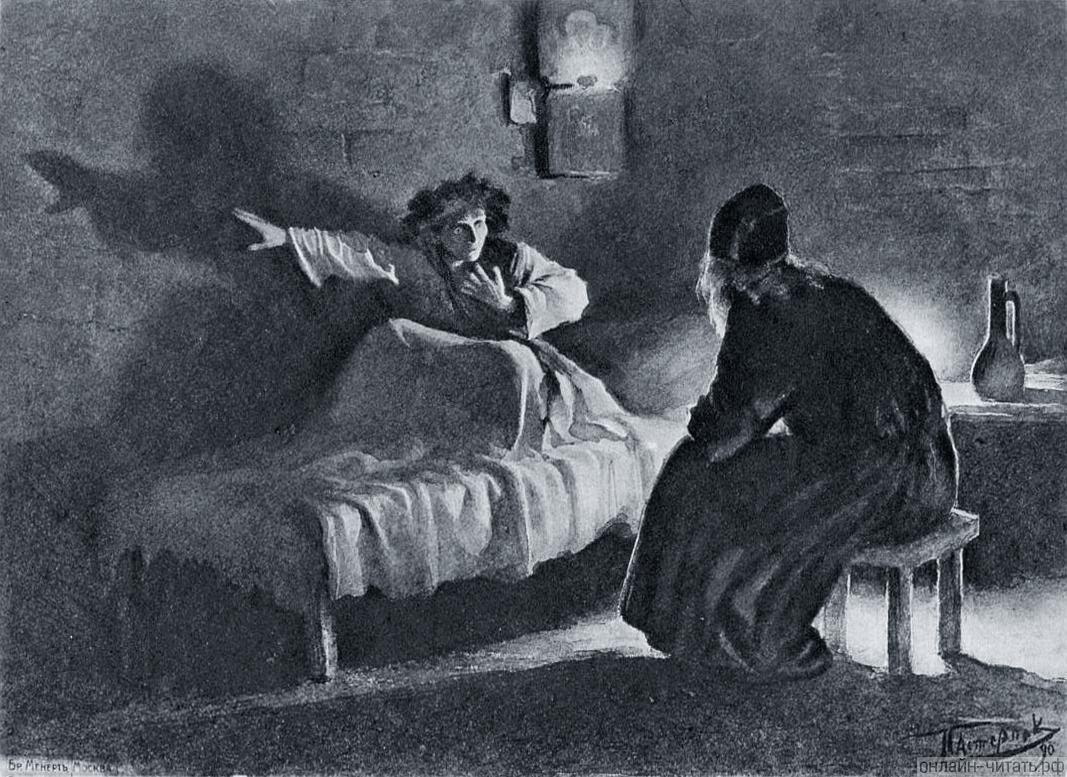 Исповедь Мцыри. Илл. Л. О. Пастернака к одноимённой поэме М. Ю. Лермонтова. Чёрная акварель. 1891 год.